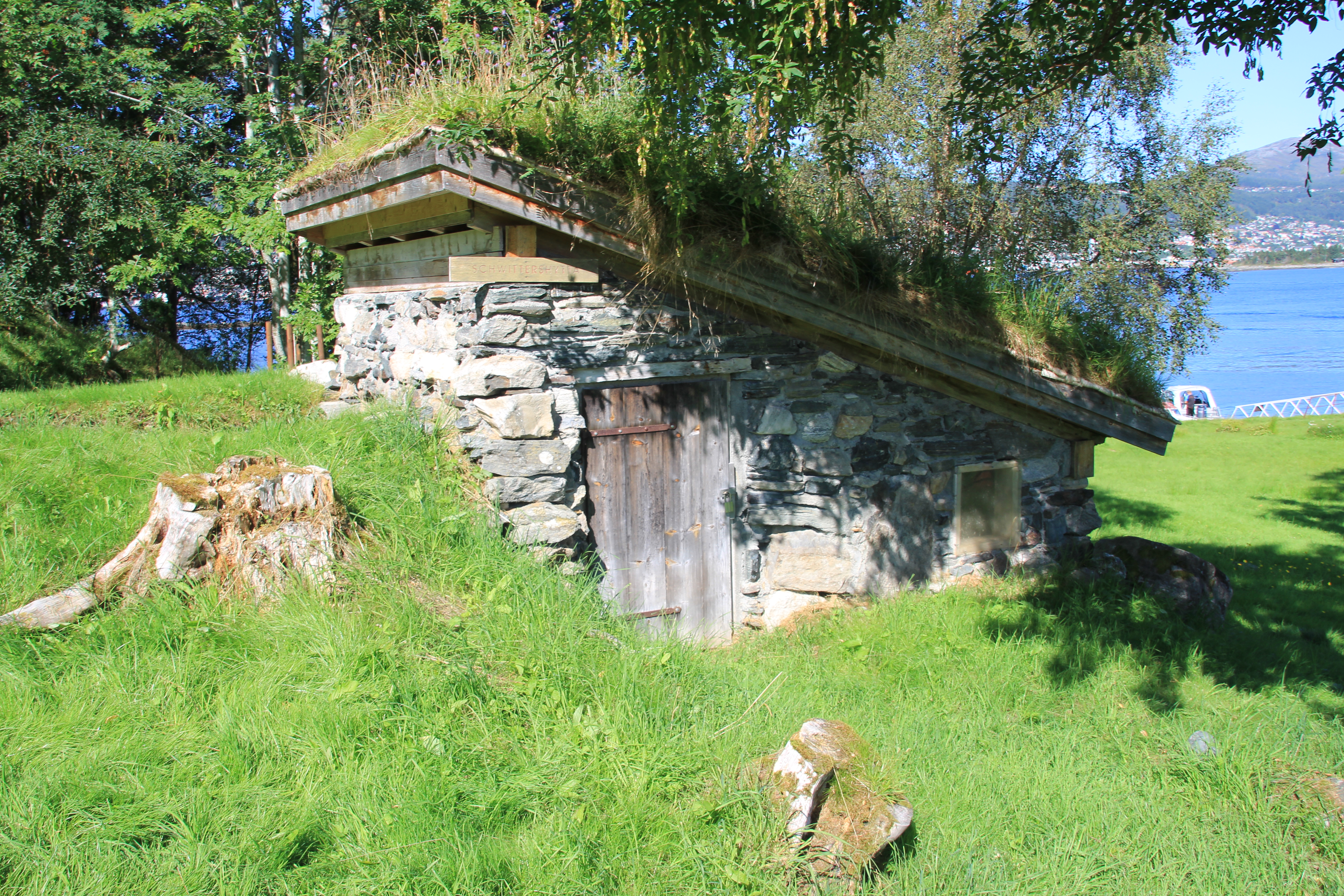 Kurt Schwitters leide denne steinhytta på Hjertøya utenfor Molde fra 1932-1937.